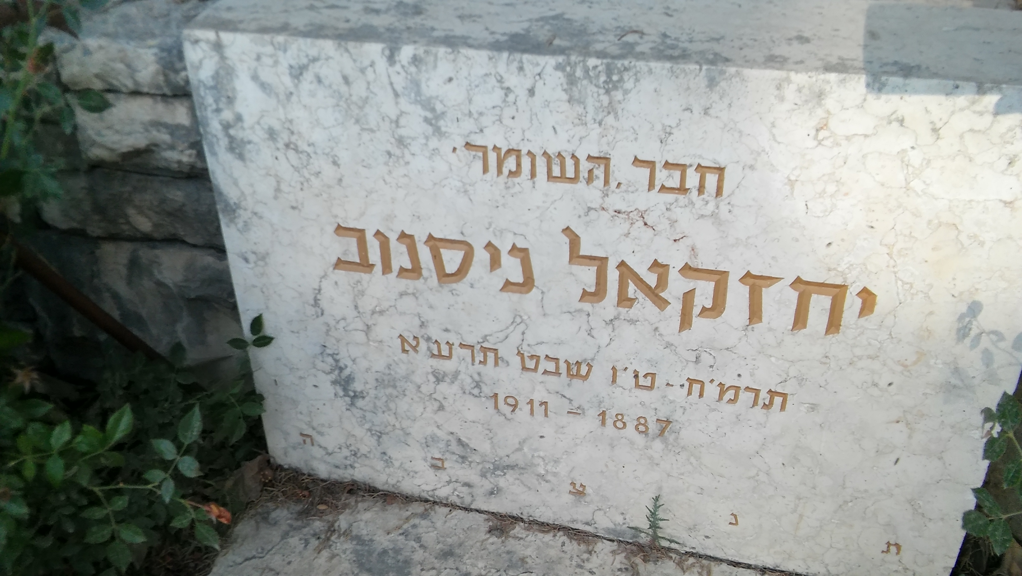 המצבה של יחזקאל ניסנוב בחלקת השומר בבית הקברות של כפר גלעדי